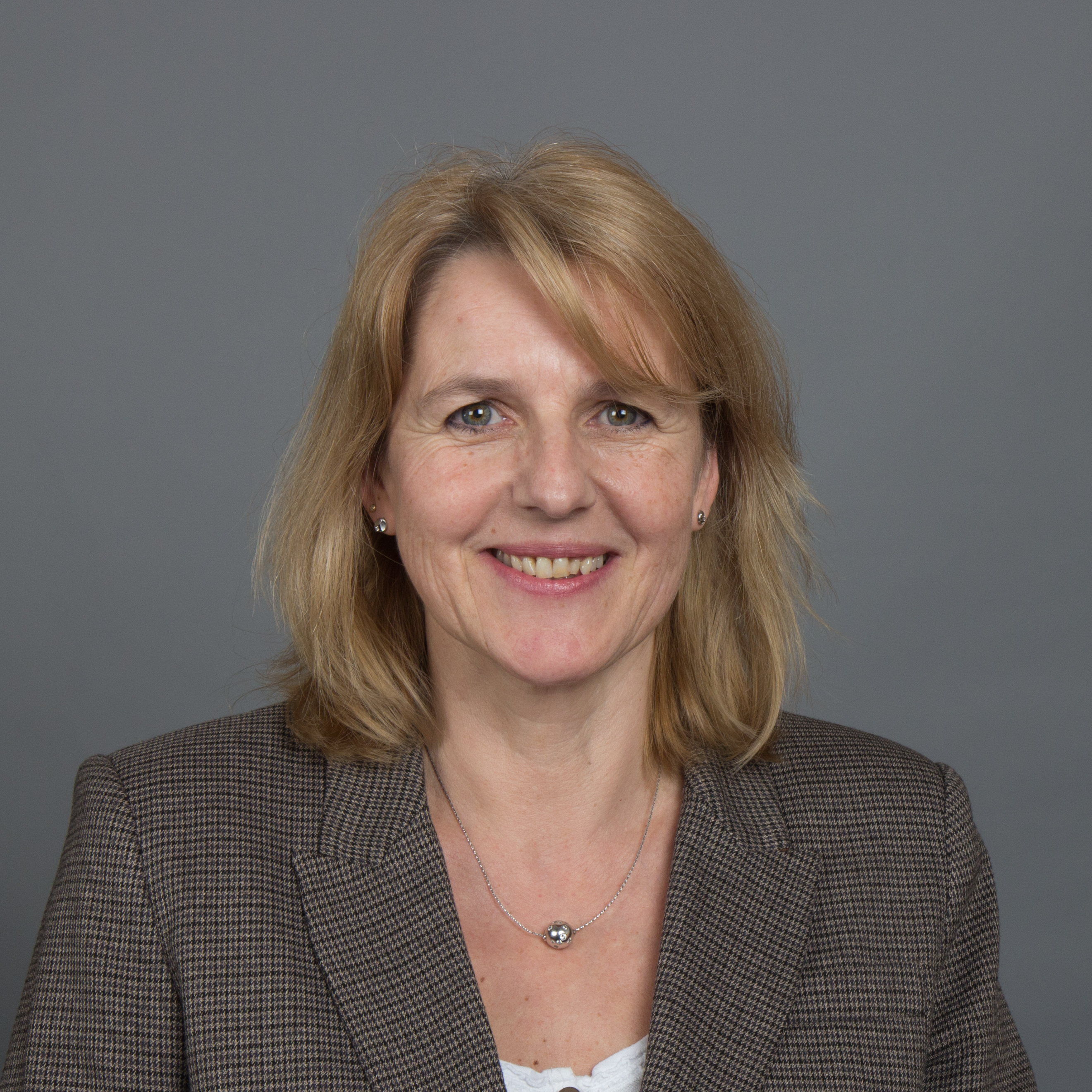 Marion SchneidLandtagsabgeordnete im Landtag Rheinland-Pfalz